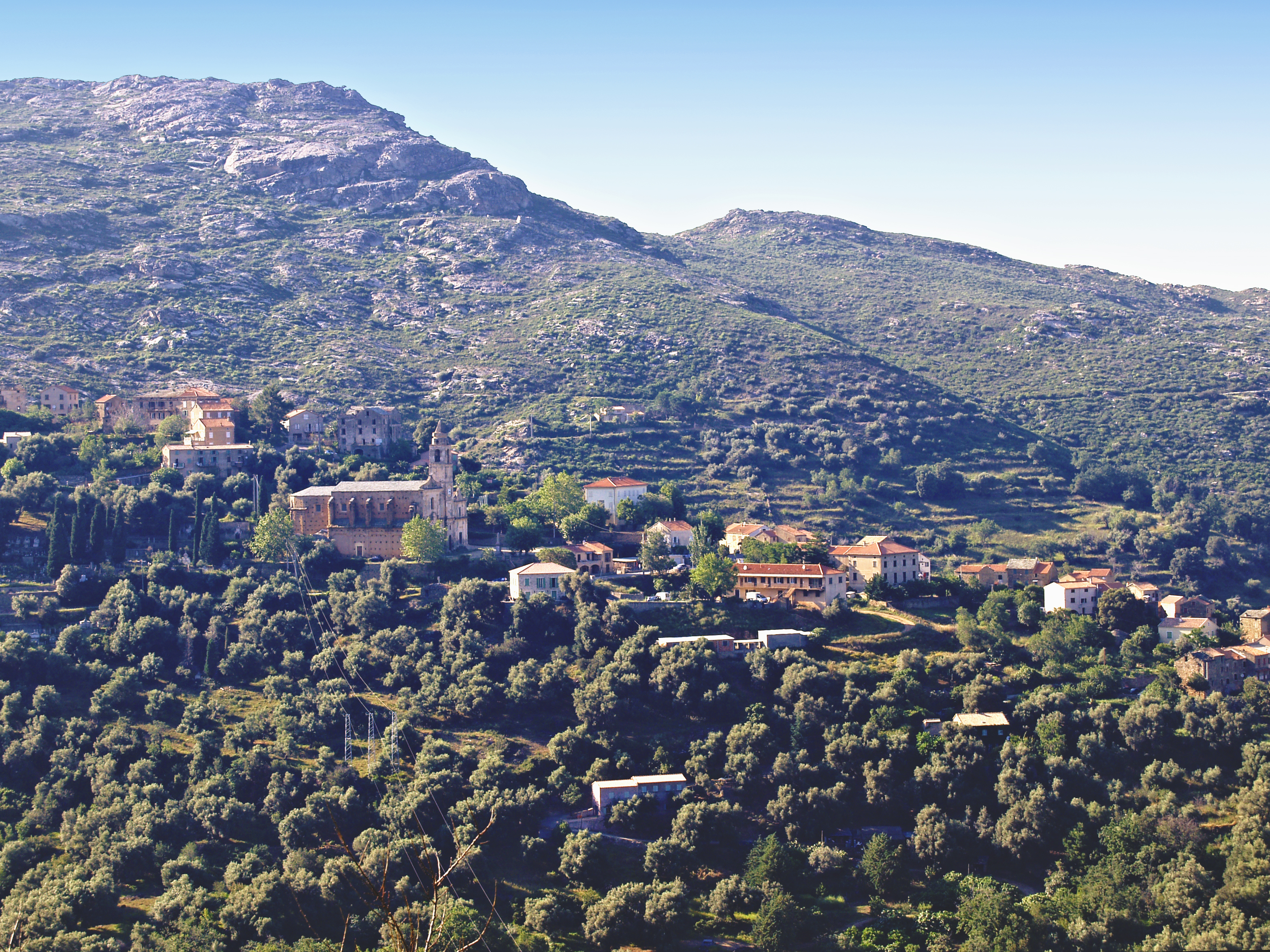 Santo-Pietro-di-Tenda (Corsica) - Vue du village